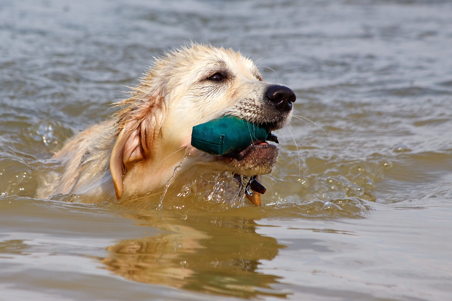 Golden Retriever beim Dummy-Training